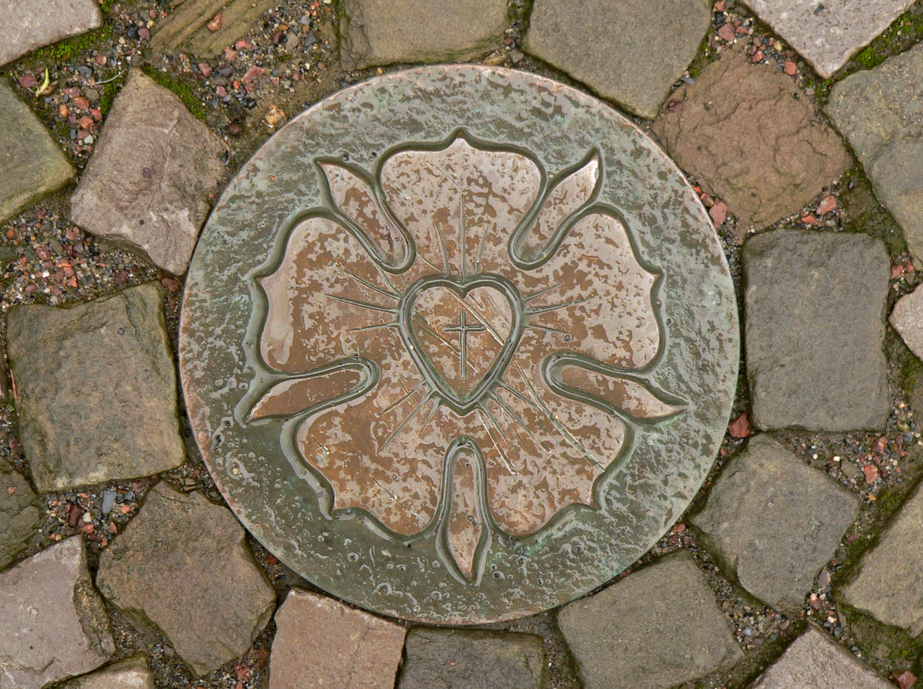 Lutherrose als Schachtdeckel in Eisleben